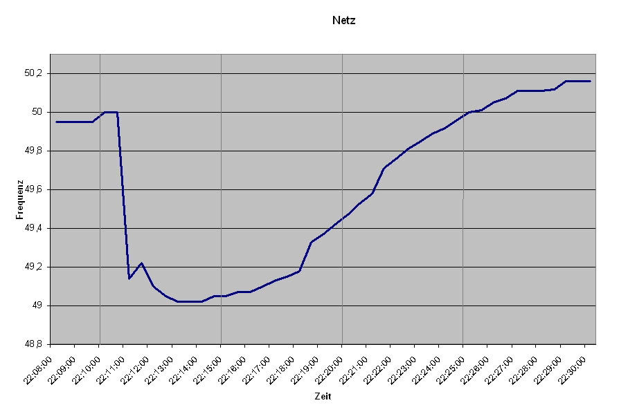 Stromausfall in Europa im November 2006: Das Bild zeigt die Frequenz des Stromnetzes am 04.11.2006 zwischen 22:08 und 22:30 MEZ gemessen im Ruhrgebiet. Es ist zu beachten, dass sich das europäische Verbundnetz während der Störung in drei Gebiete aufgetrennt hat, in denen die Netzfrequenz einen unterschiedlichen Verlauf genommen hat. Diese Kurve zeigt den Verlauf der Frequenz in dem Bereich des Netzes, der in der Nachricht der UCTE vom 05.11.2006 als Area 1 gekennzeichnet ist. Dieser Bereich umfasst Westeuropa, wobei die Trennungsgrenze mitten durch Deutschland und Österreich verläuft.